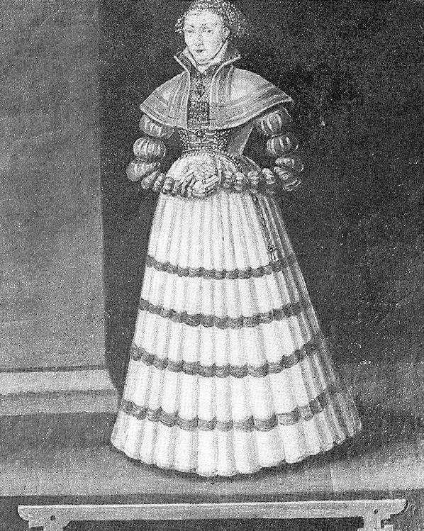 Anna von Brandenburg, Ehefrau von Albrecht VII.